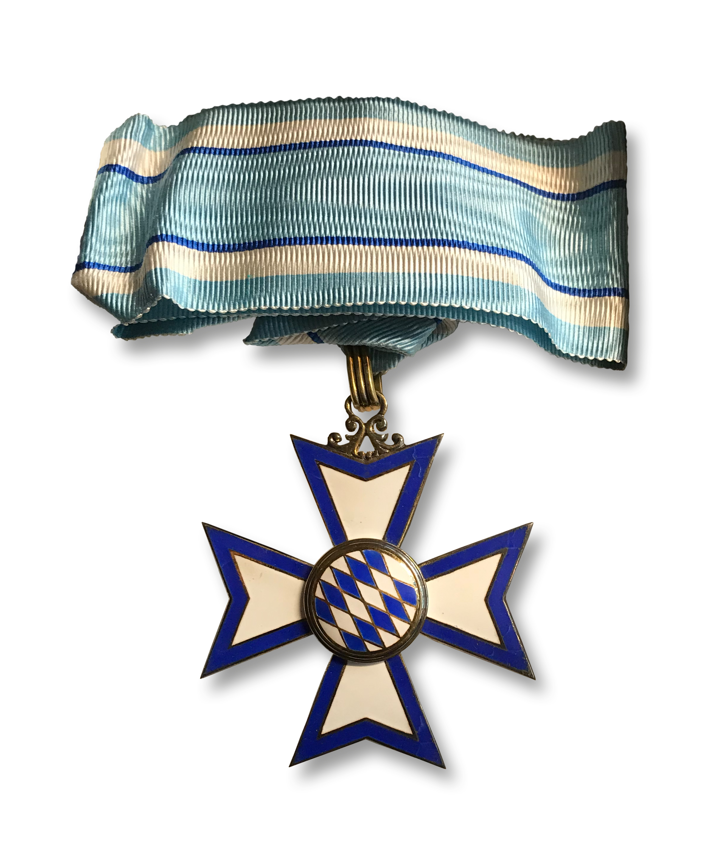 Bayerischer Verdienstorden in der Herrenausführung (Avers)